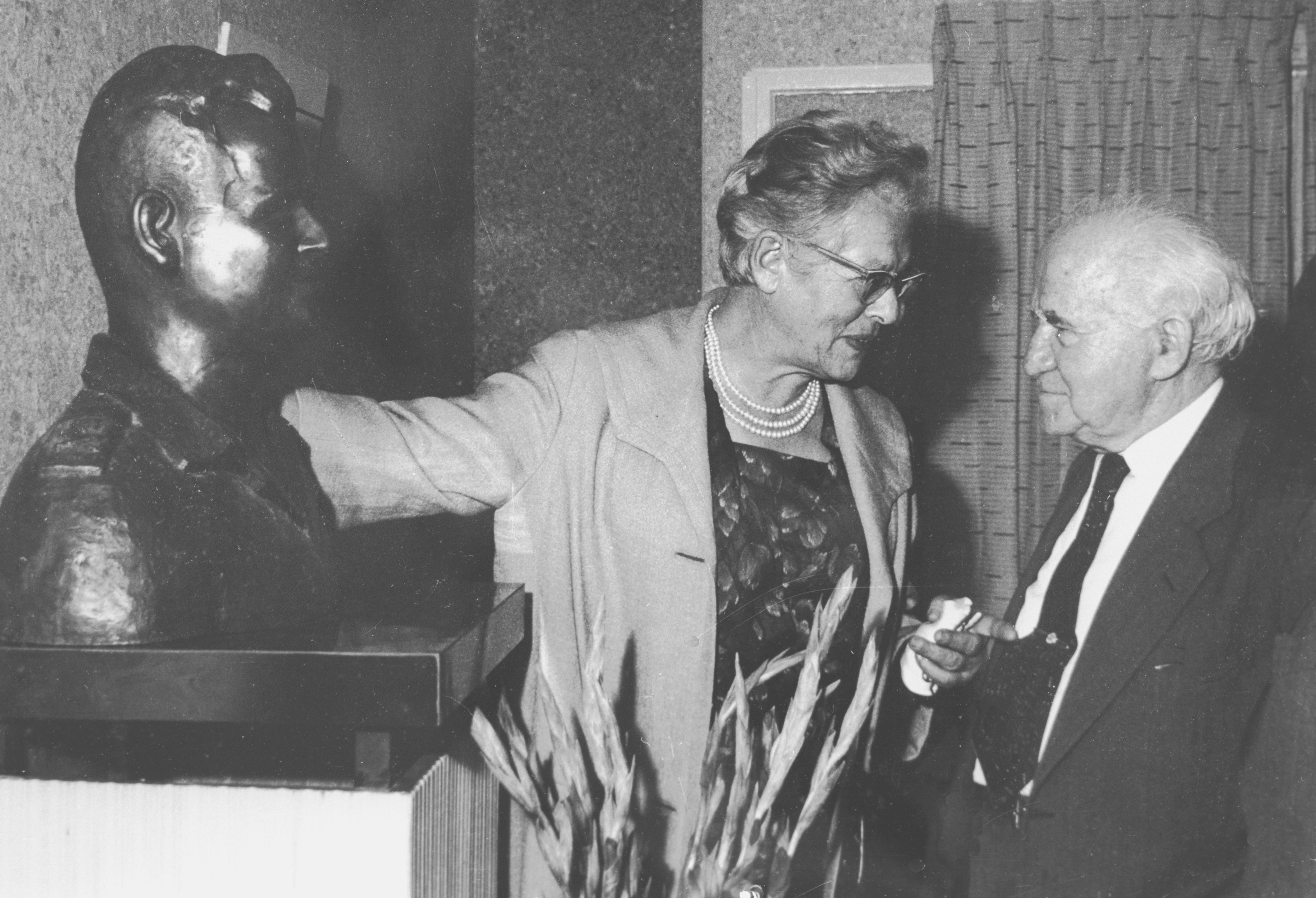 יהודית שמחוני ודוד בן גוריון בטקס פתיחת הספריה הצבאית על שם בנה, אסף שמחוני, באוניברסיטת תל אביב